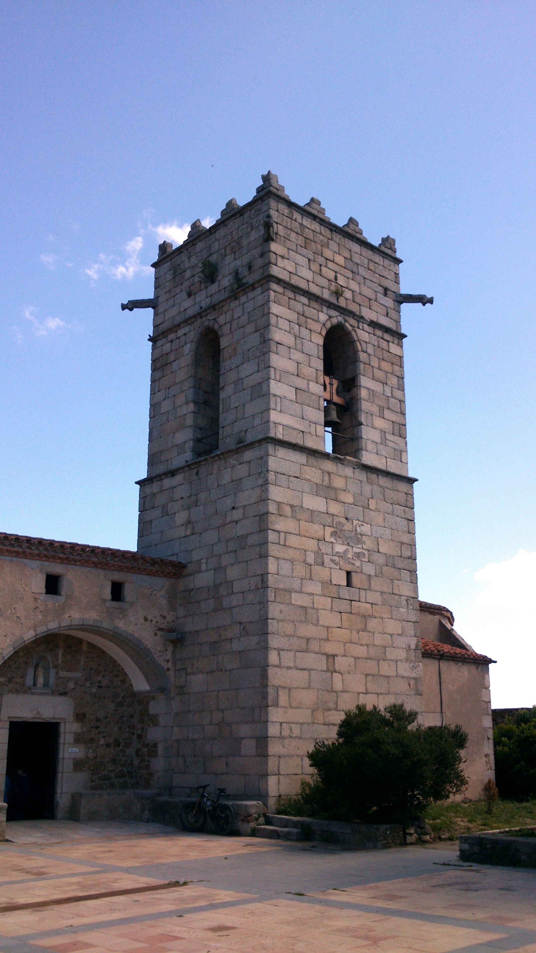 Santuari del corredor